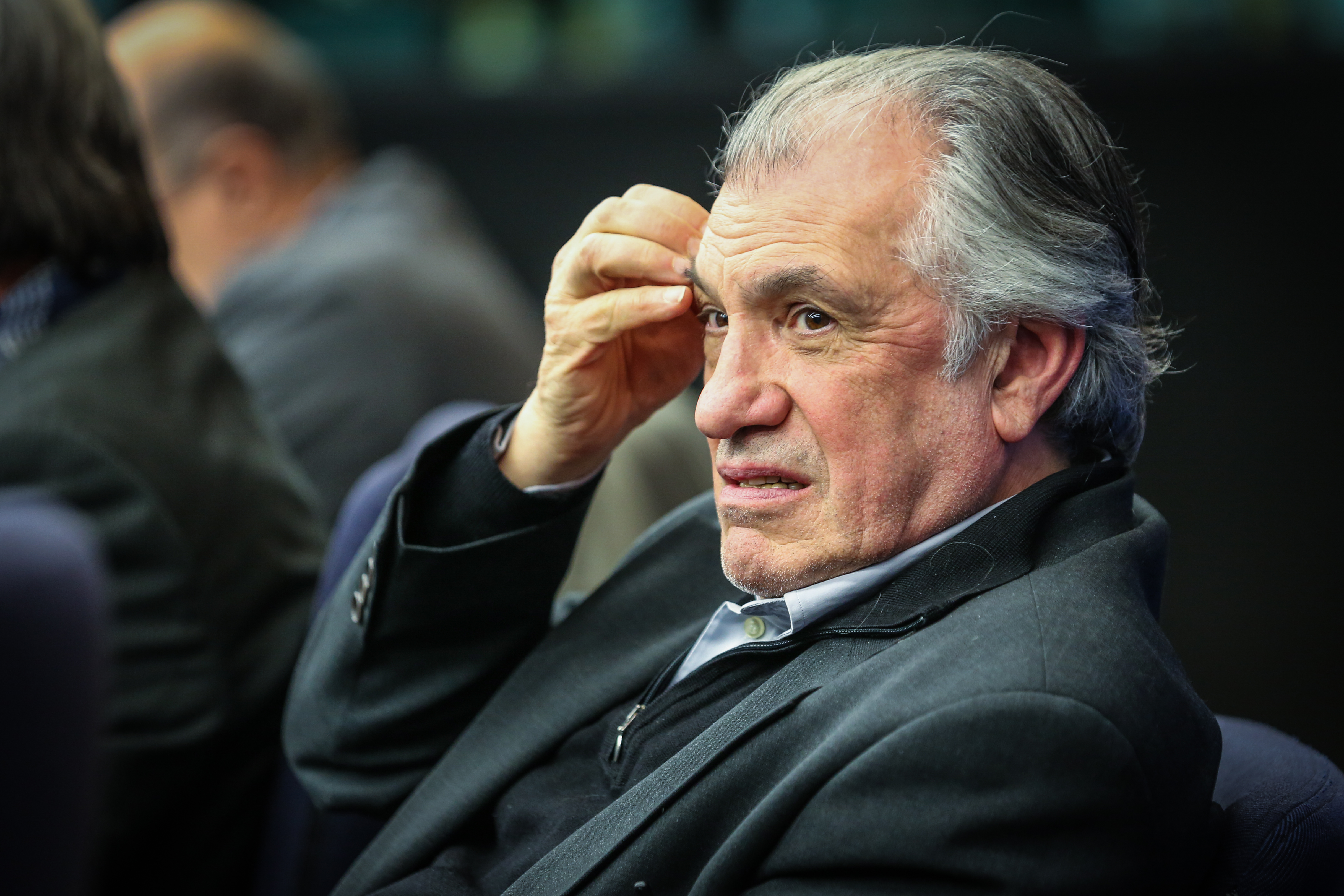 Conférence de presse et cérémonie d’inauguration de caliquots demandant la liberté pour les journalistes otages en Syrie. Parlement européen de Strasbourg, 5 février 2014 Serge July.